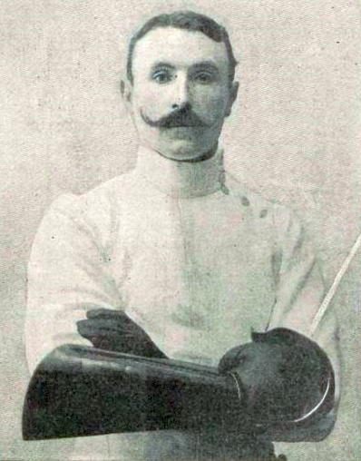 Le capitaine comte Georges de la Falaise, au sabre en 1900.